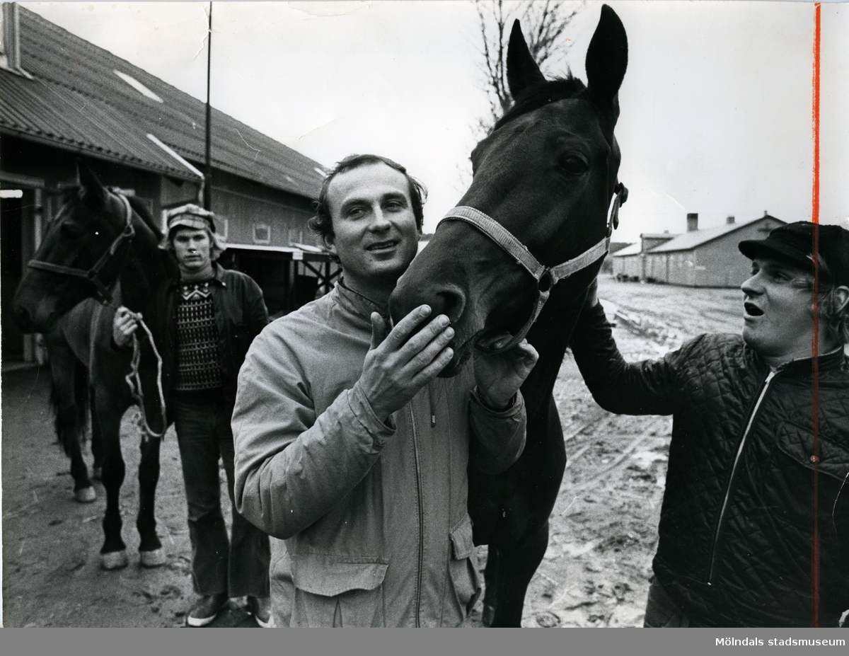 Olle Goop, välkänd travtränare stationerad på Åby tillsammans med personal 1972. Blandade bilder inslamlade i samband med dokumentation av Åby Stallbacke och Stallgårdarna 2015.